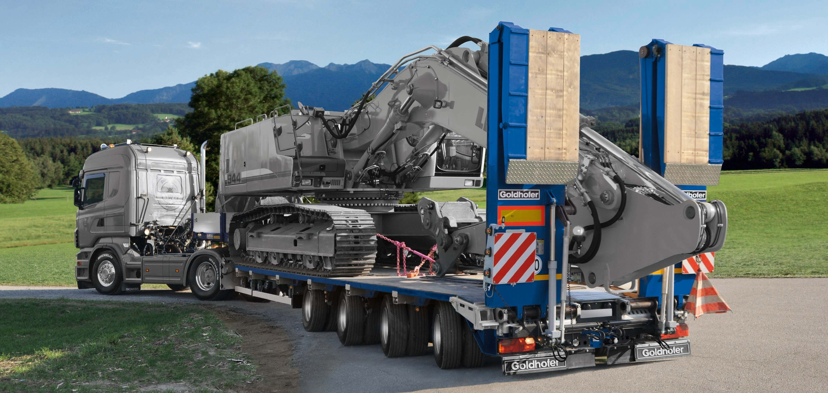 Transport eines Baggers